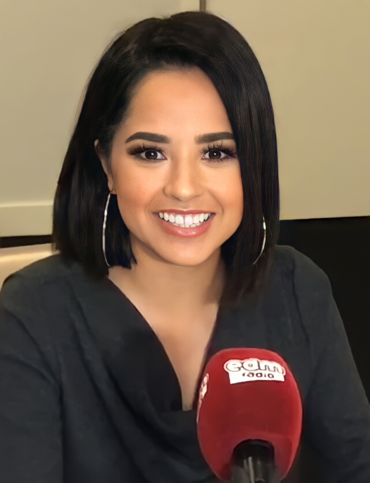 Entrevistamos en una mesa redonda a Becky G. en la que nos habla de su trayectoria y del éxito de su canción "Mayores"